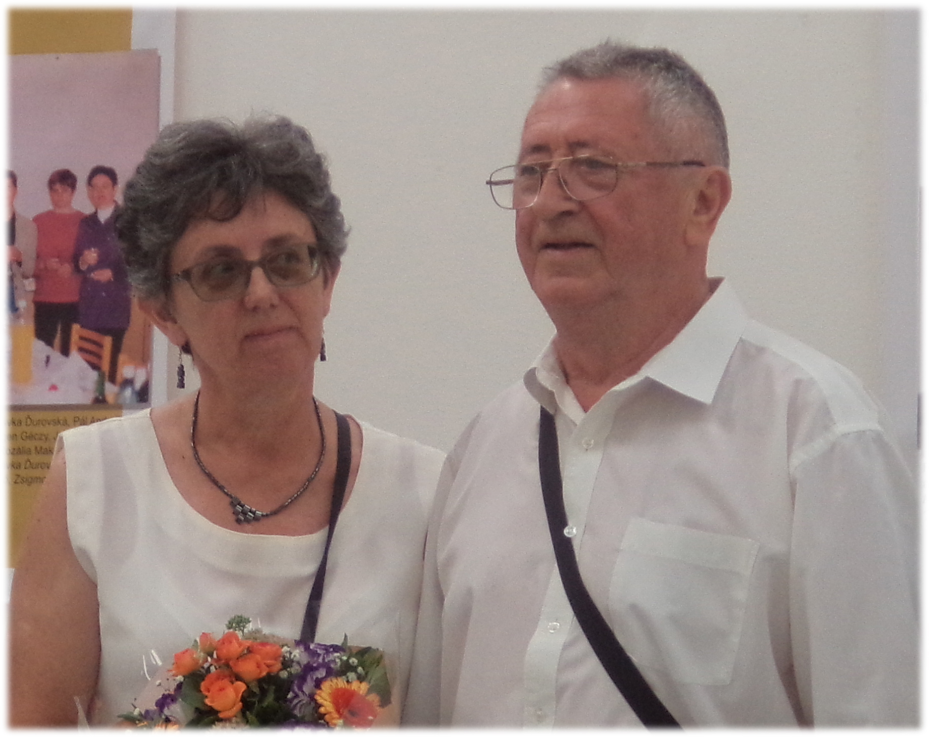 Bevilagua Olga és Végh László kitüntetettek Dunaszerdahelyen 2019. szeptember 5-én